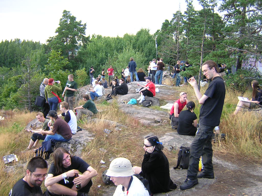 Boozembly 2005